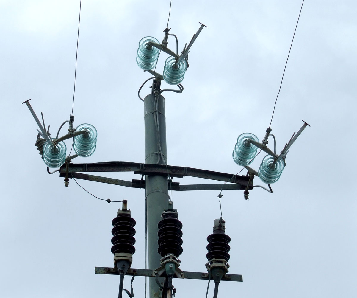 Isolatori media tensione (in vetro) e isolatori di intestazione cavo (in marrone)